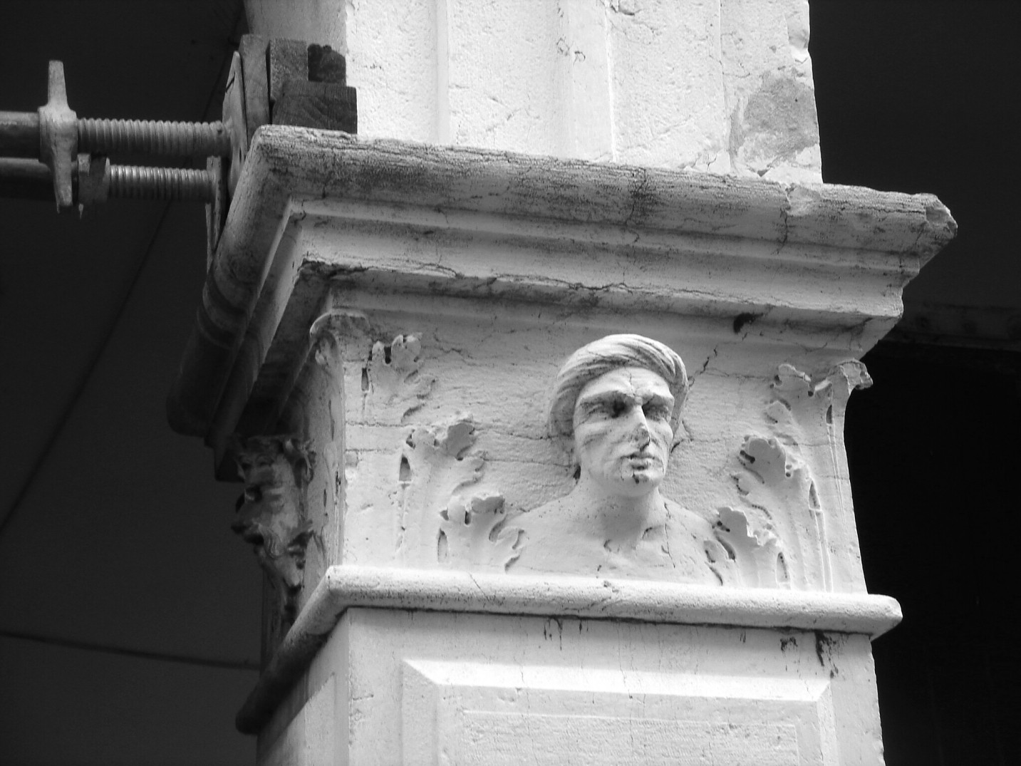 Conegliano (Treviso): particolare degli elementi scultore dei pilastri della facciata rinascimentale di Palazzo Sarcinelli.